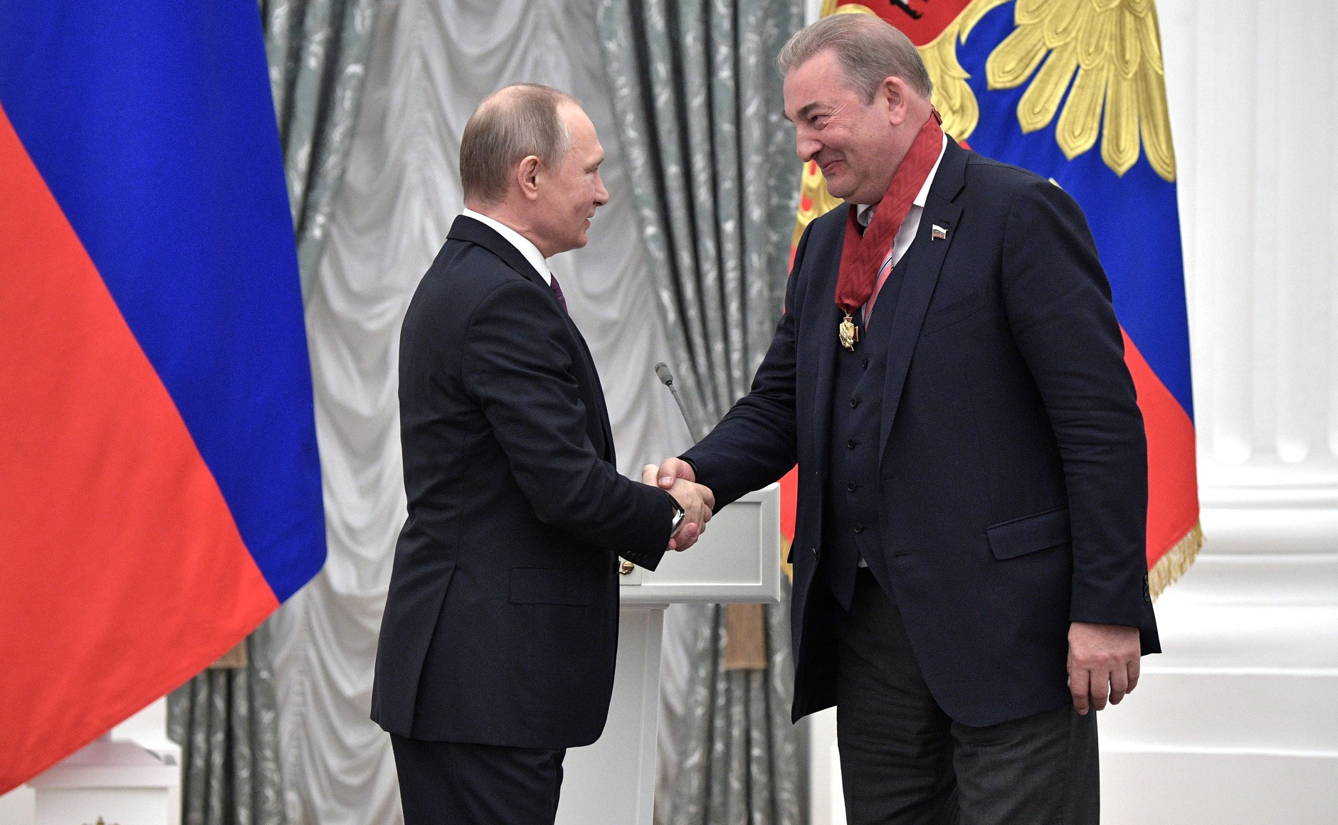 На церемонии вручения государственных наград. Орденом «За заслуги перед Отечеством» II степени награждён Владислав Третьяк – депутат Государственной Думы Федерального Собрания